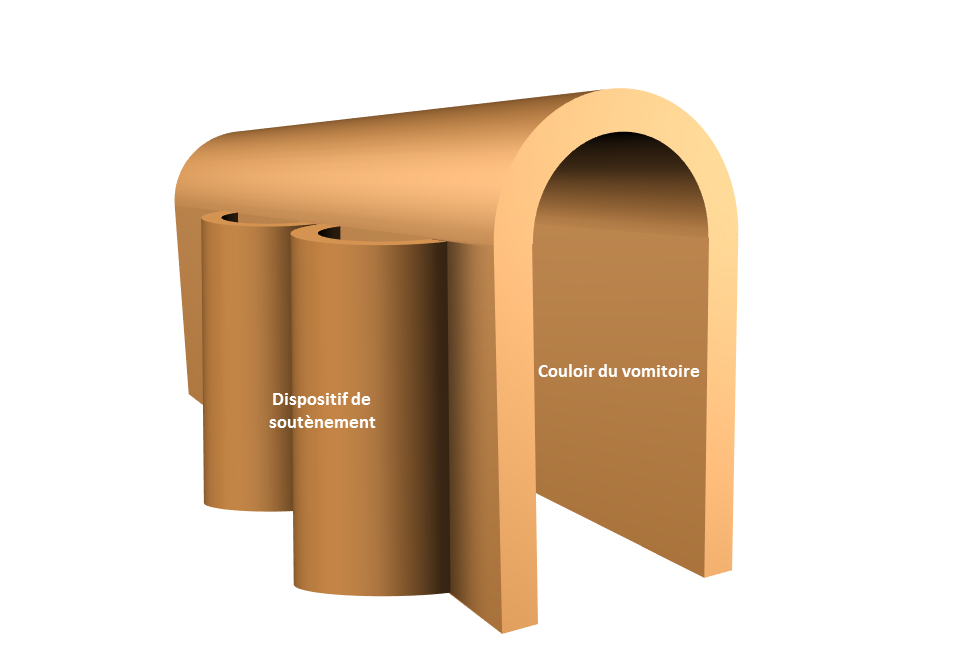 Dispositif de renfort des vomitoires de l'amphithéâtre de Tours